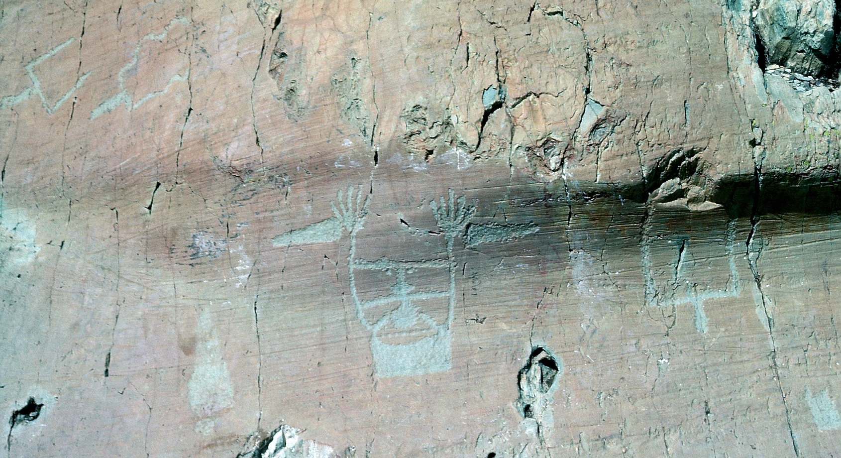 La Vallée des Merveilles, France. Le sorcier